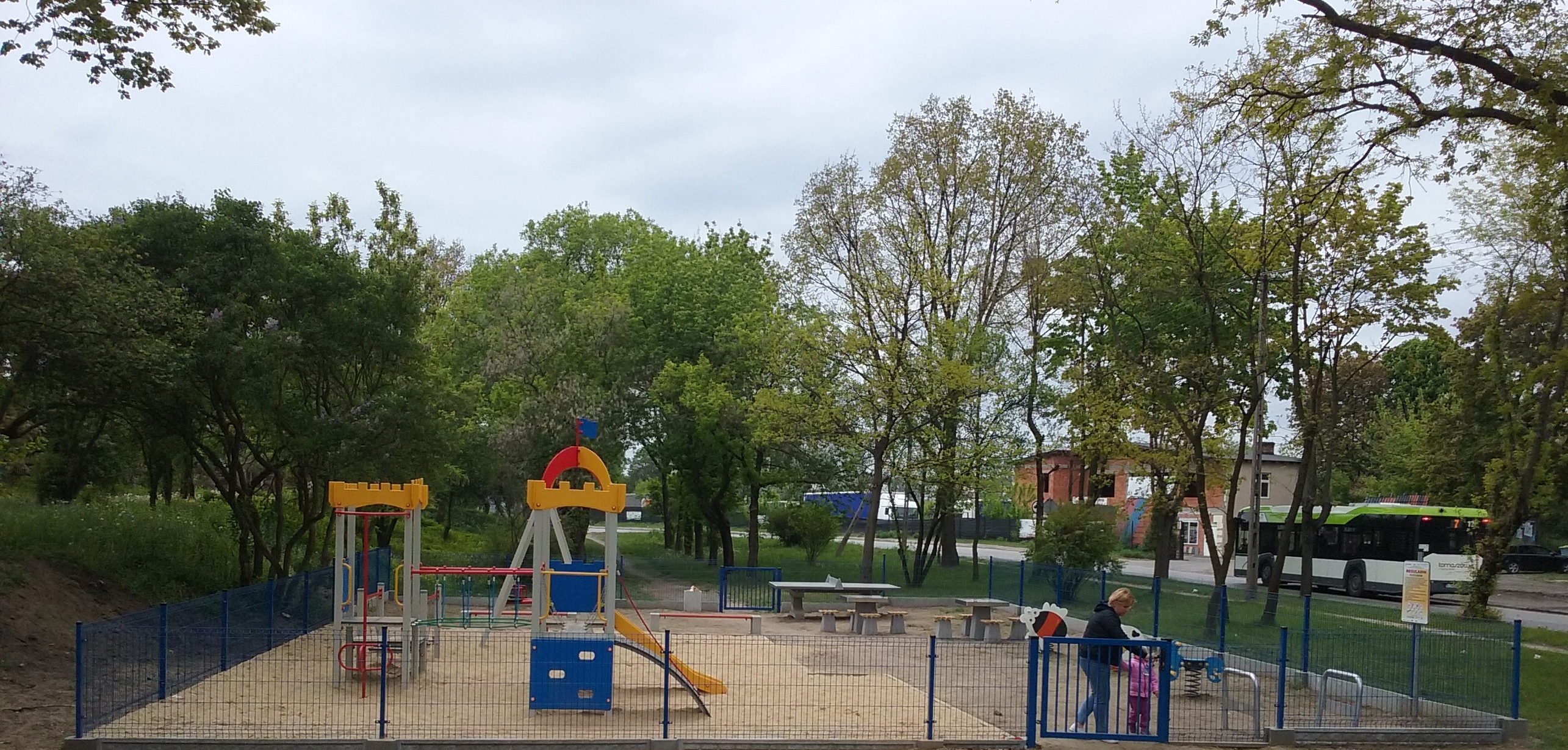 Tomaszów Mazowiecki w województwie łódzkim, PL, EU. Plac zabaw przy tomaszowskich dworcach. Róg ulic Garbarskiej i Dworcowej. CC0